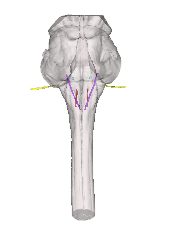 IX.bikote kraneala eta nukleo anbiguoa, beheko listu nukleoa eta traktu bakartiaren nukleoak ikusten dira.